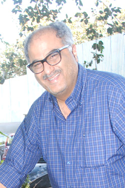 Boney Kapoor